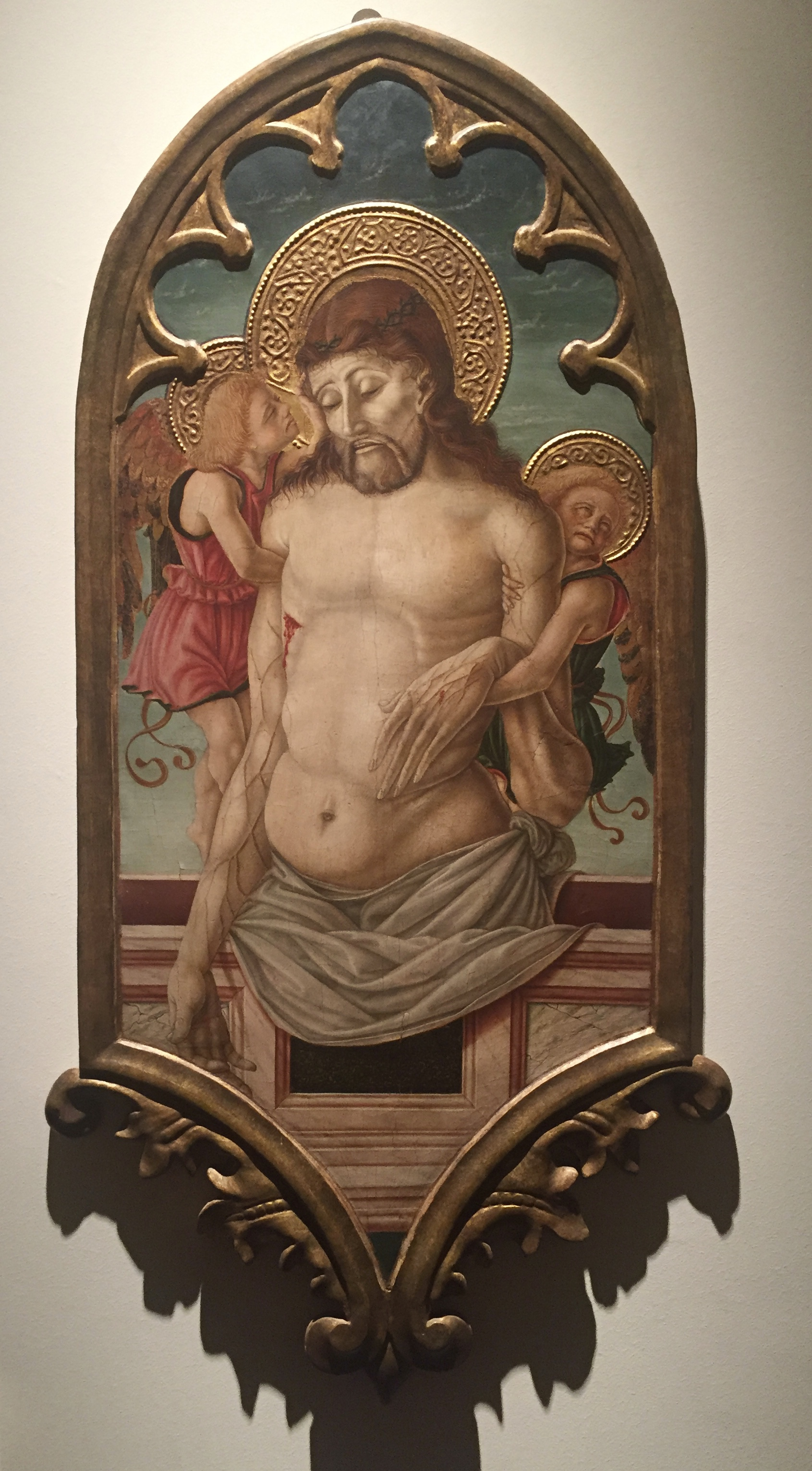 Christ mort dans son tombeau soutenu par deux Anges, Nicola di Maestro Antonio di Ancona, fin du Quattrocento. (partie d’un polyptyque démembré provenant de l’église de San Marco à Jesi